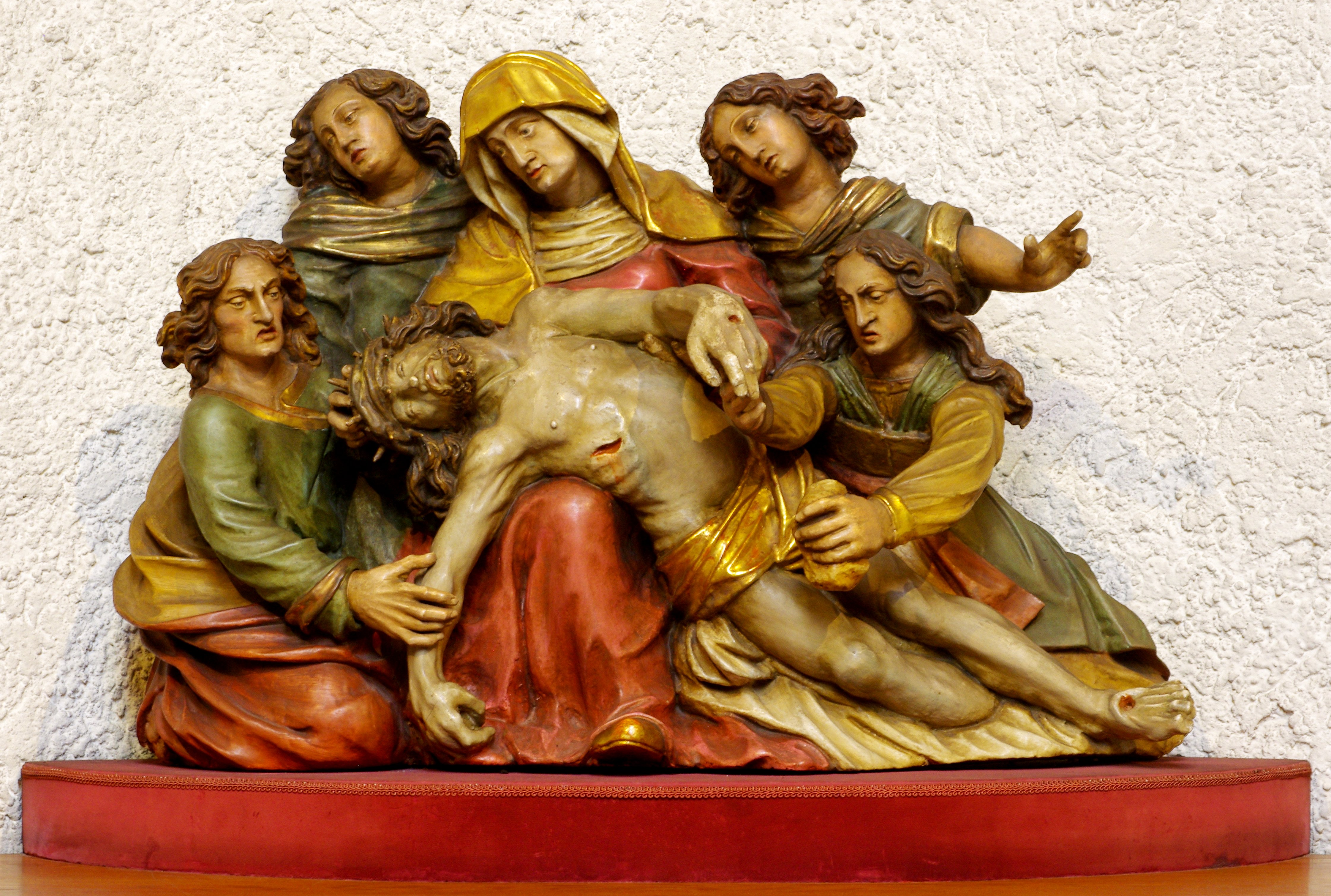 Die Pfarrkirche St. Martin in Vöhrenbach